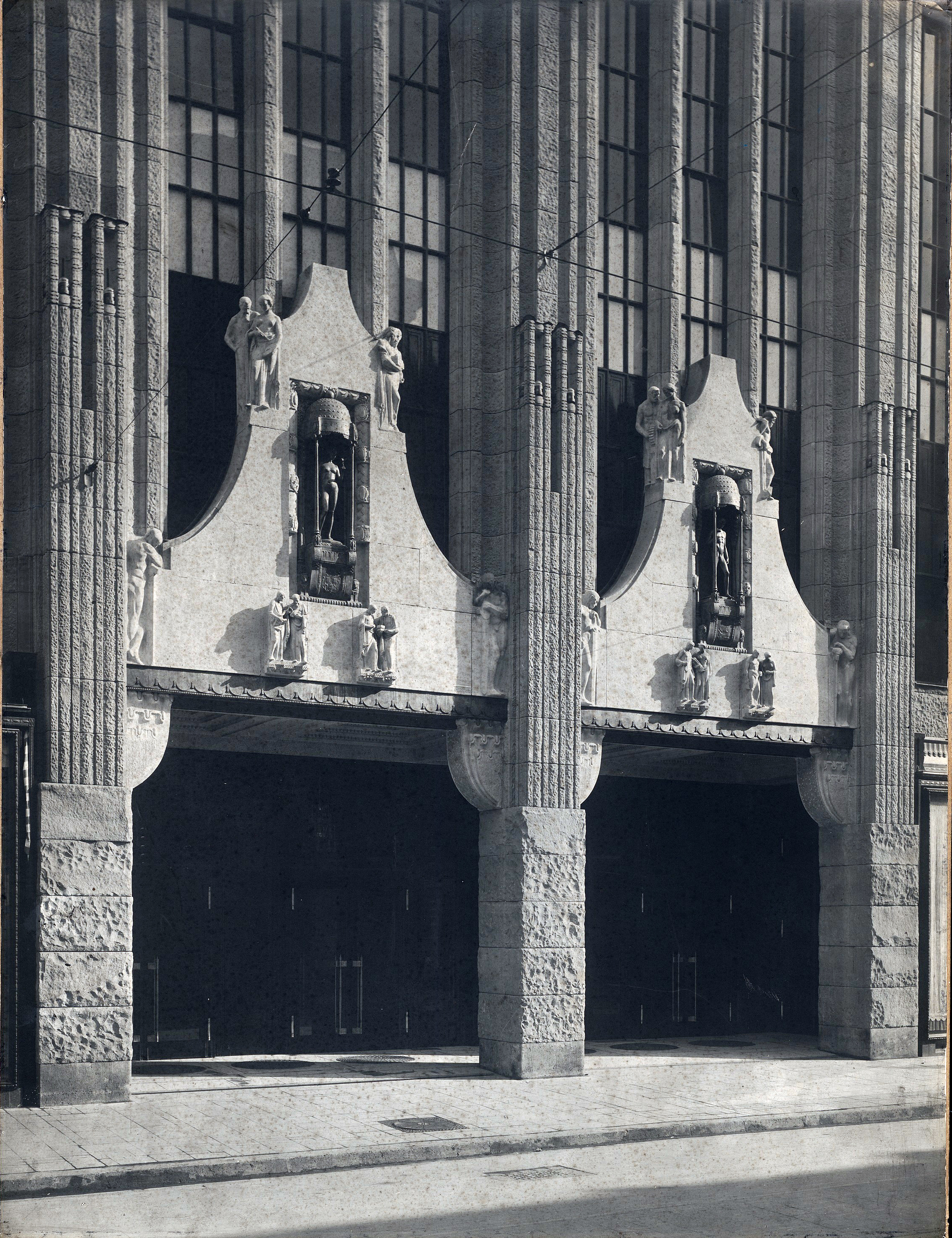 Olbrich Joseph Maria (1867-1908), Warenhaus Leonhard Tietz AG, Düsseldorf: Ansicht des Hauptportals des Warenhauses Leonh. Tietz in Düsseldorf. Foto auf Karton, 64,7 x 49,8 cm (inkl. Scanrand). Architekturmuseum der Technischen Universität Berlin Inv. Nr. F 9718.